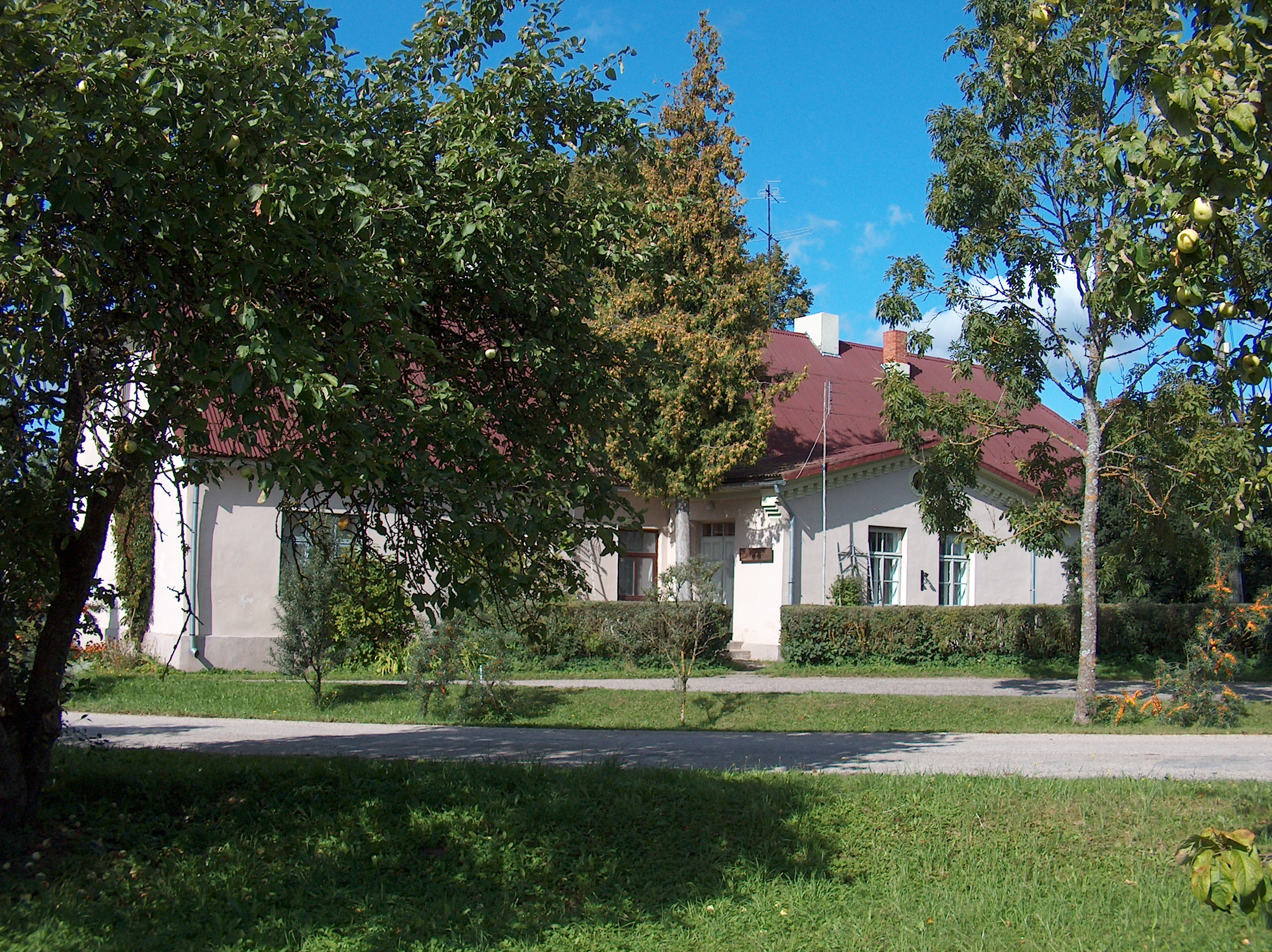 Talsu mežniecība Kuršos